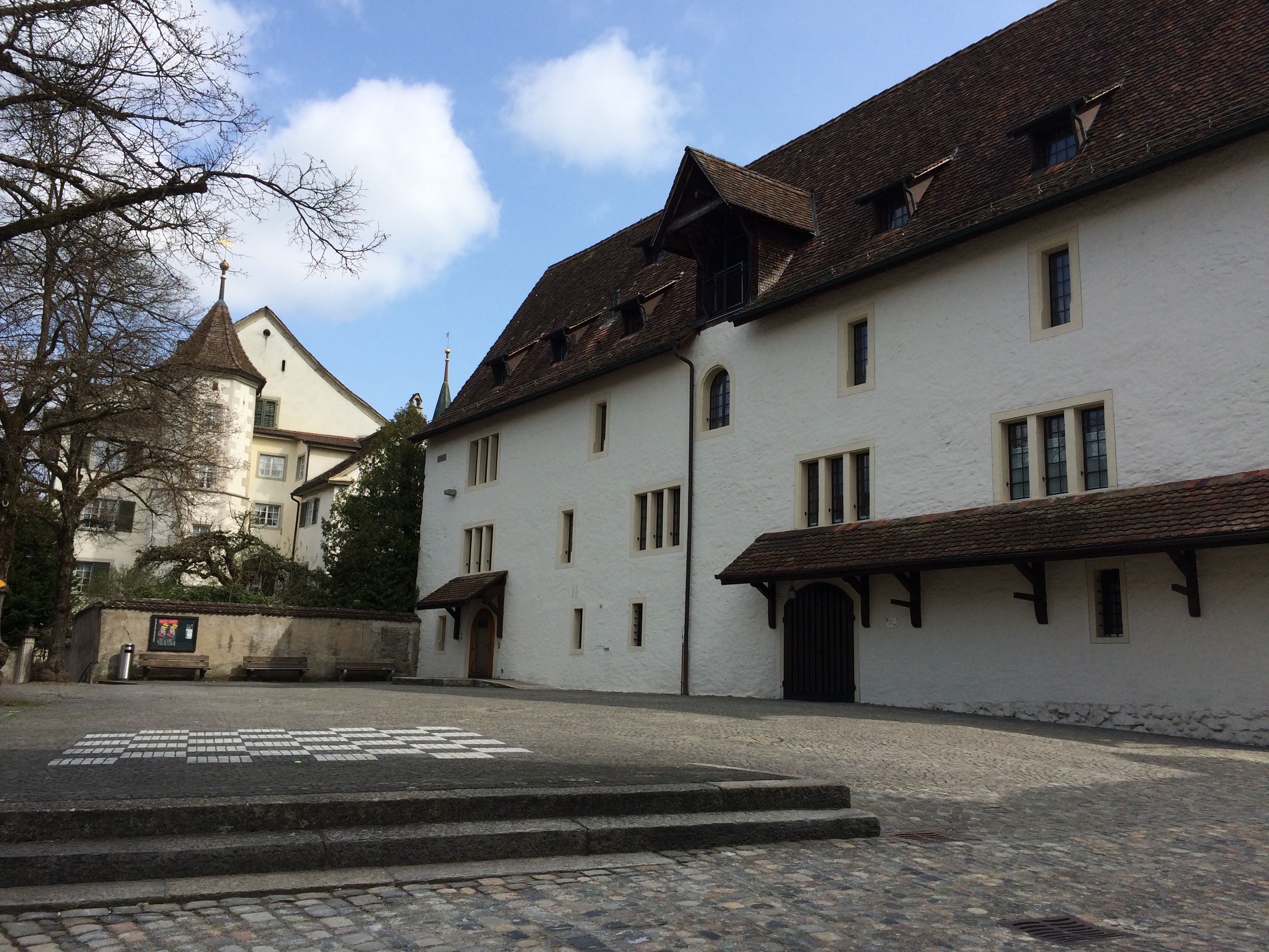 Das Kellertheater Bremgarten im Schellenhaus